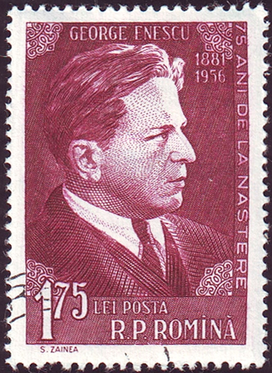 Georges Enesco (1881–1955), compositeur roumain